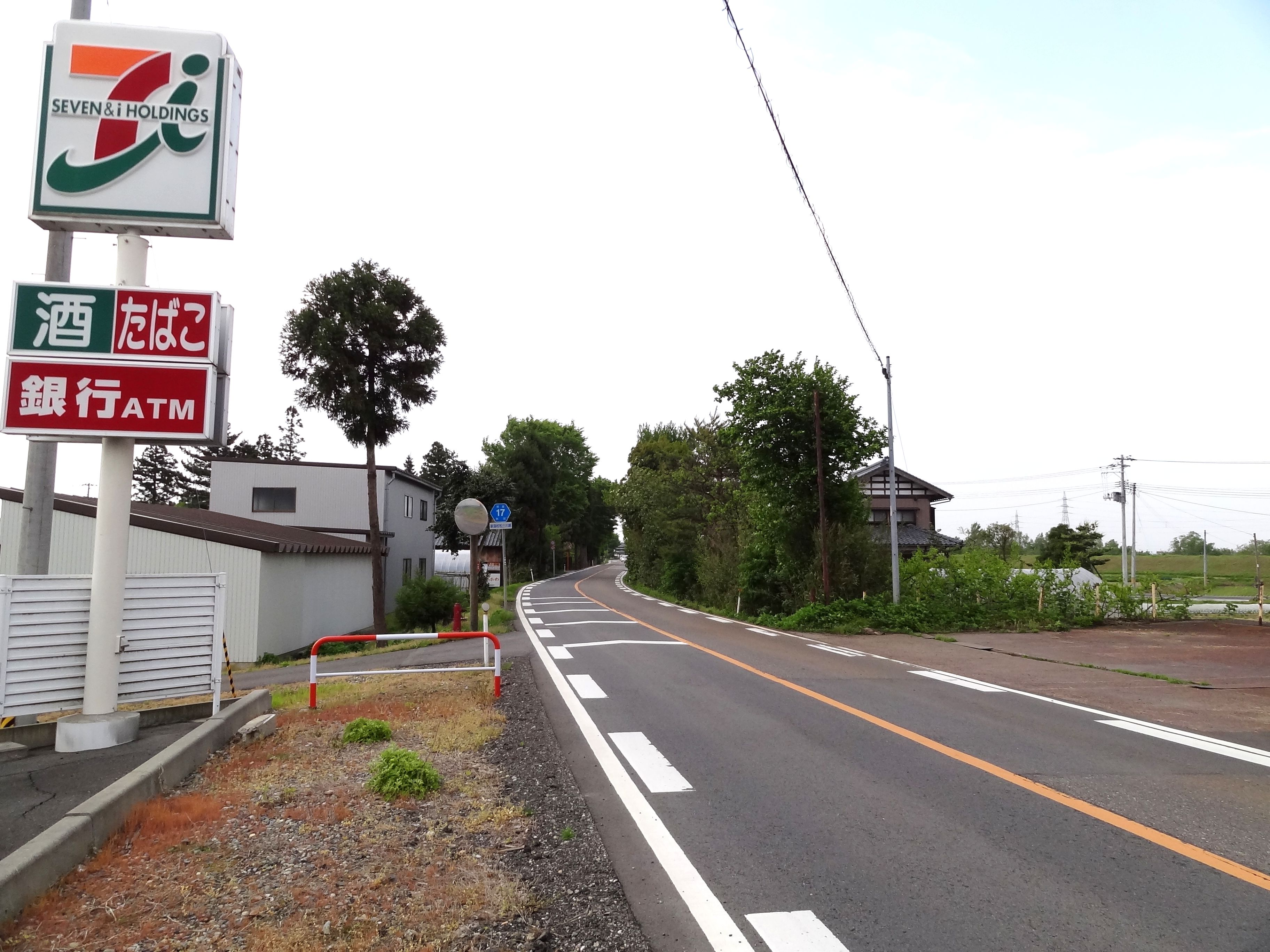 新潟県道17号新潟村松三川線 五泉市船越付近